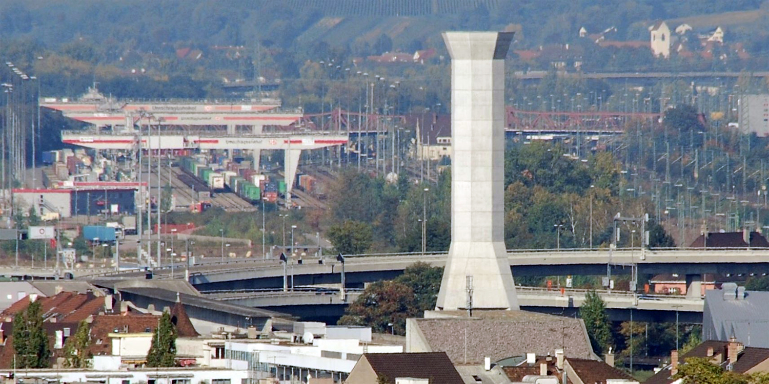 Nordtangente in Basel, im Hintergrund der Güterbahnhof von Weil am Rhein